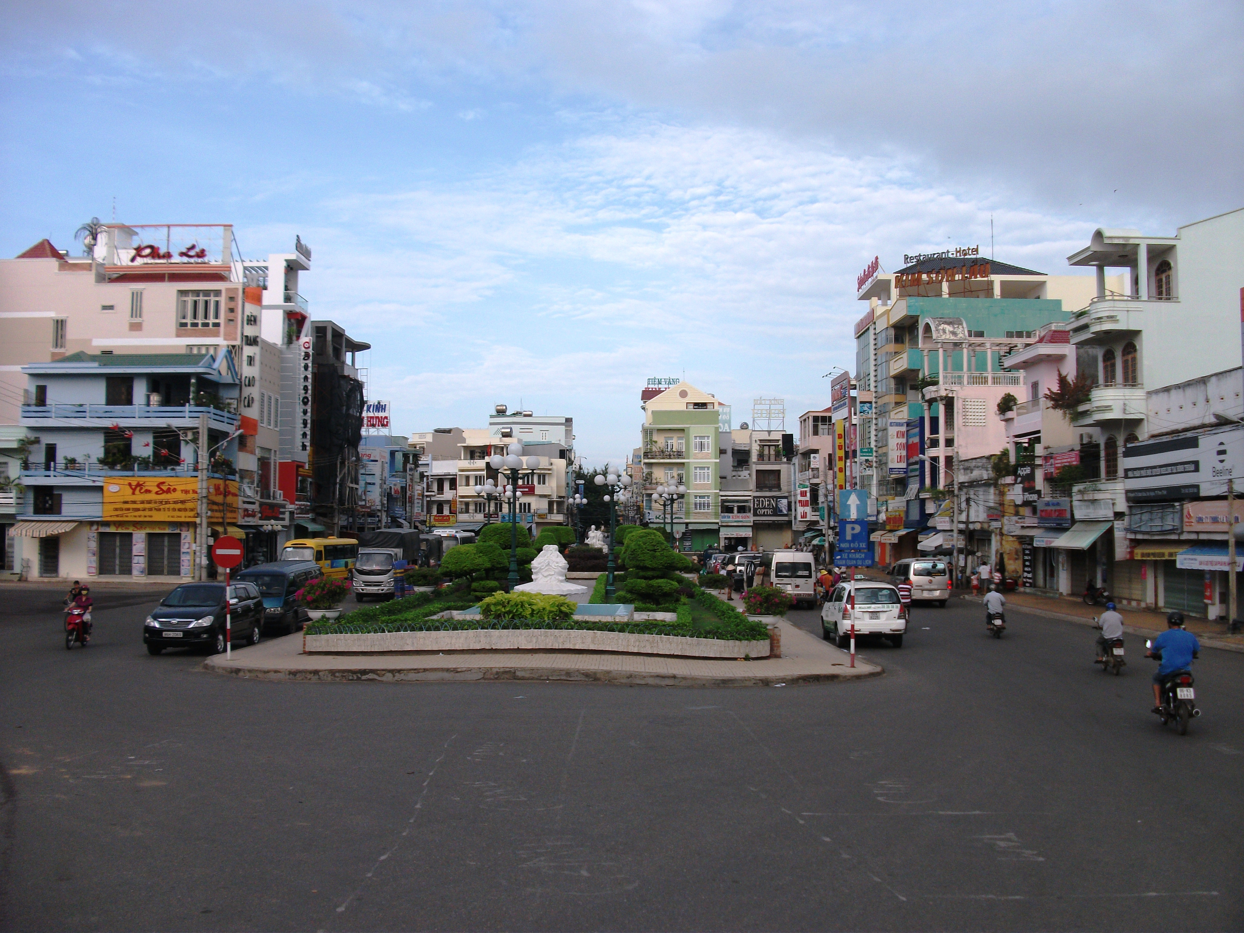 Trung tâm TP. Phan Thiết (Bình Thuận, Việt Nam)